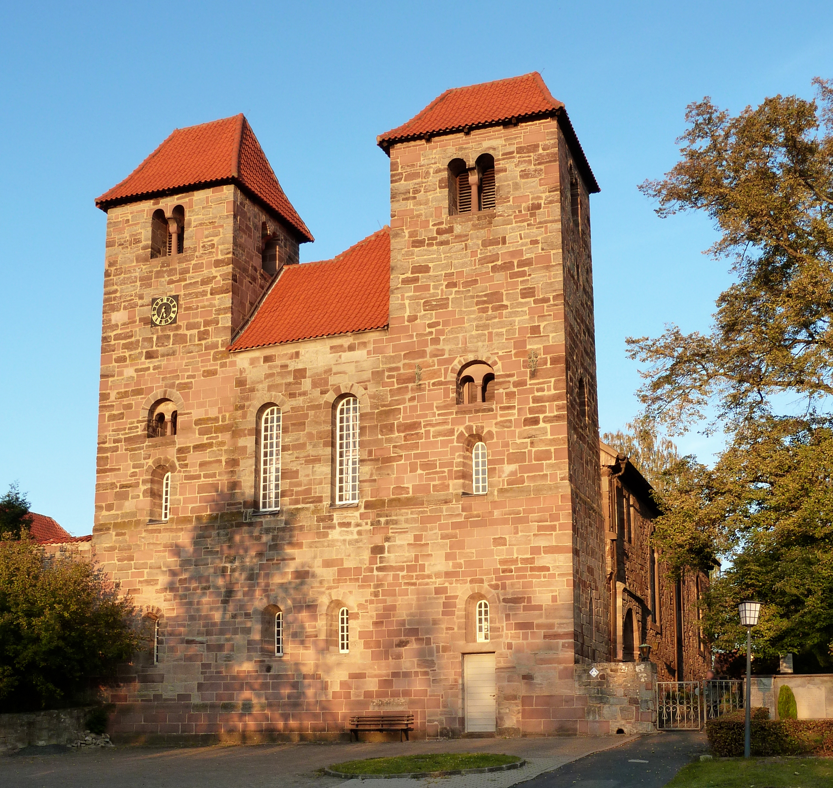 Südwestansicht der ehemaligen Klosterkirche Reinhausen, heute ev.-luth. Gemeindekirche. Erbaut im 10. Jahrhundert als Burgkirche, romanischer Umbau und Erweiterung zur Klosterkirche im 11. - 13. Jahrhundert, umfangreiche spätere gotische und barocke Umbauten